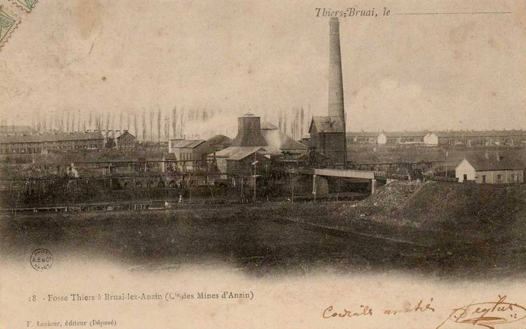 Fosse Thiers de la Compagnie des mines d'Anzin, Saint-Saulve, Nord, Nord-Pas-de-Calais, France.